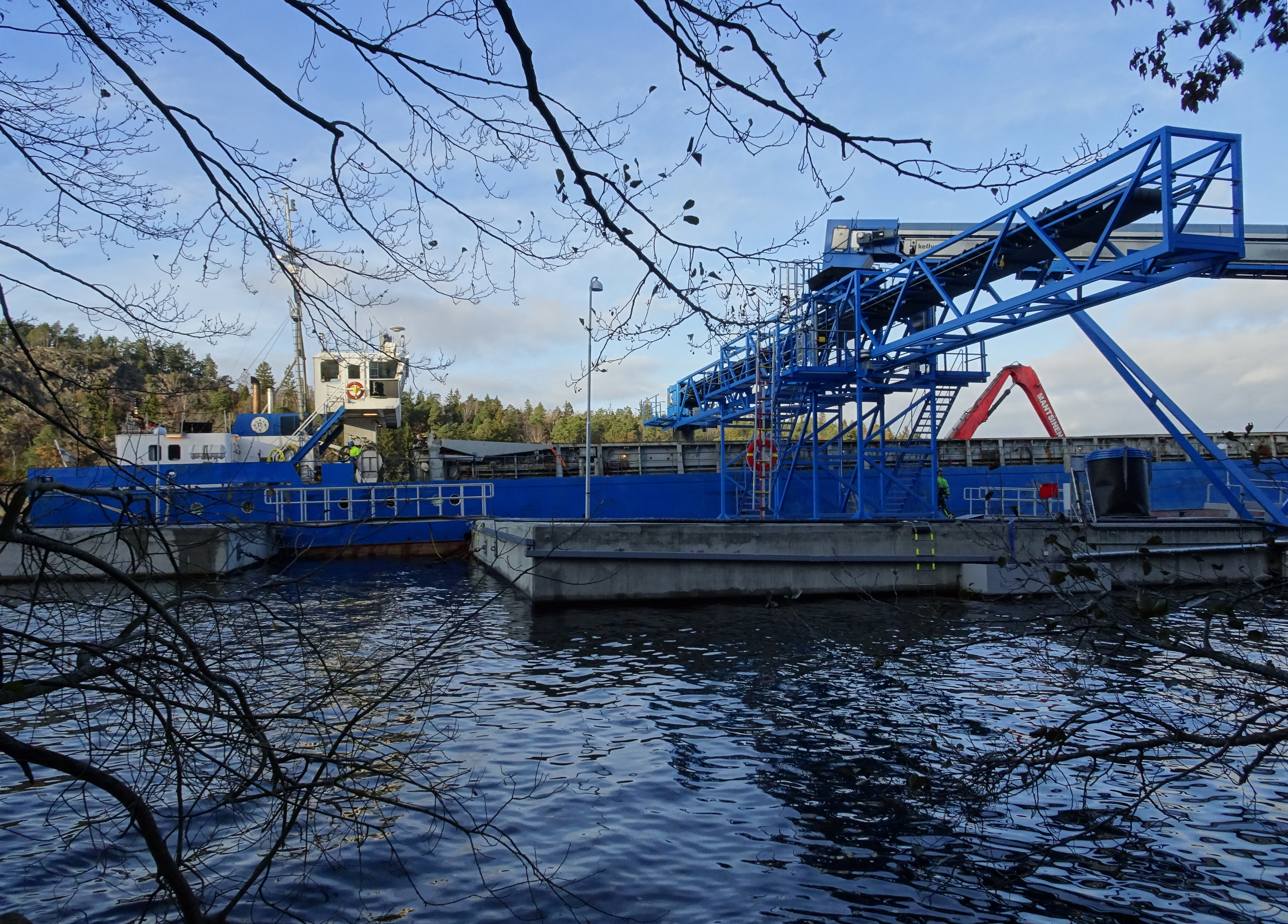 Provisoriska hamnen vid Sätra varv för avtransport av sprängsten från Förbifart Stockholm